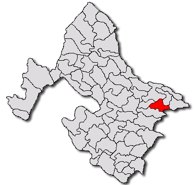 Categorie:Hărţi ale judeţului Mehedinţi